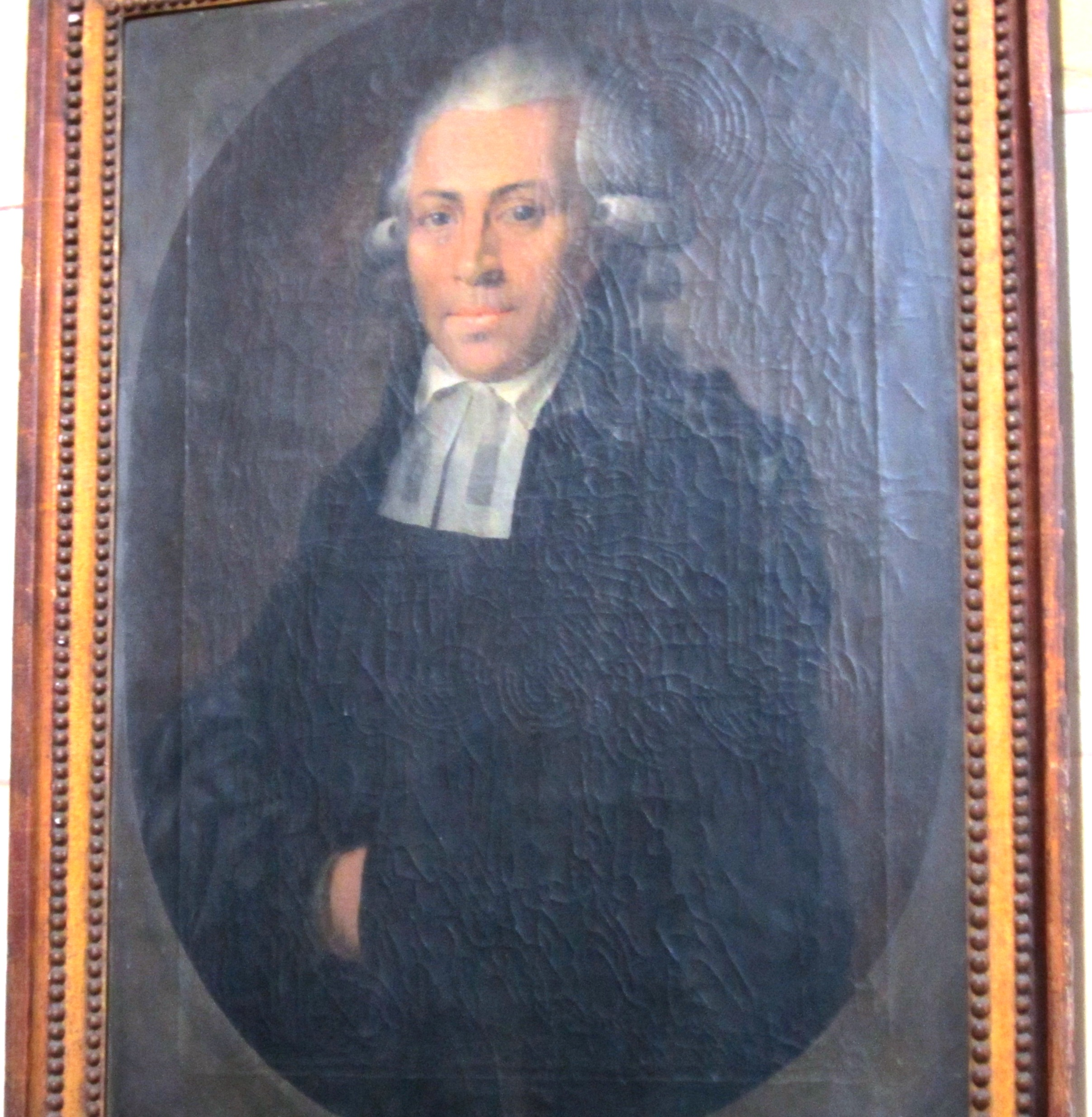 Bildnis des Pastors Johann Elias Werner (1751–1835) in der Marienkirche Barth